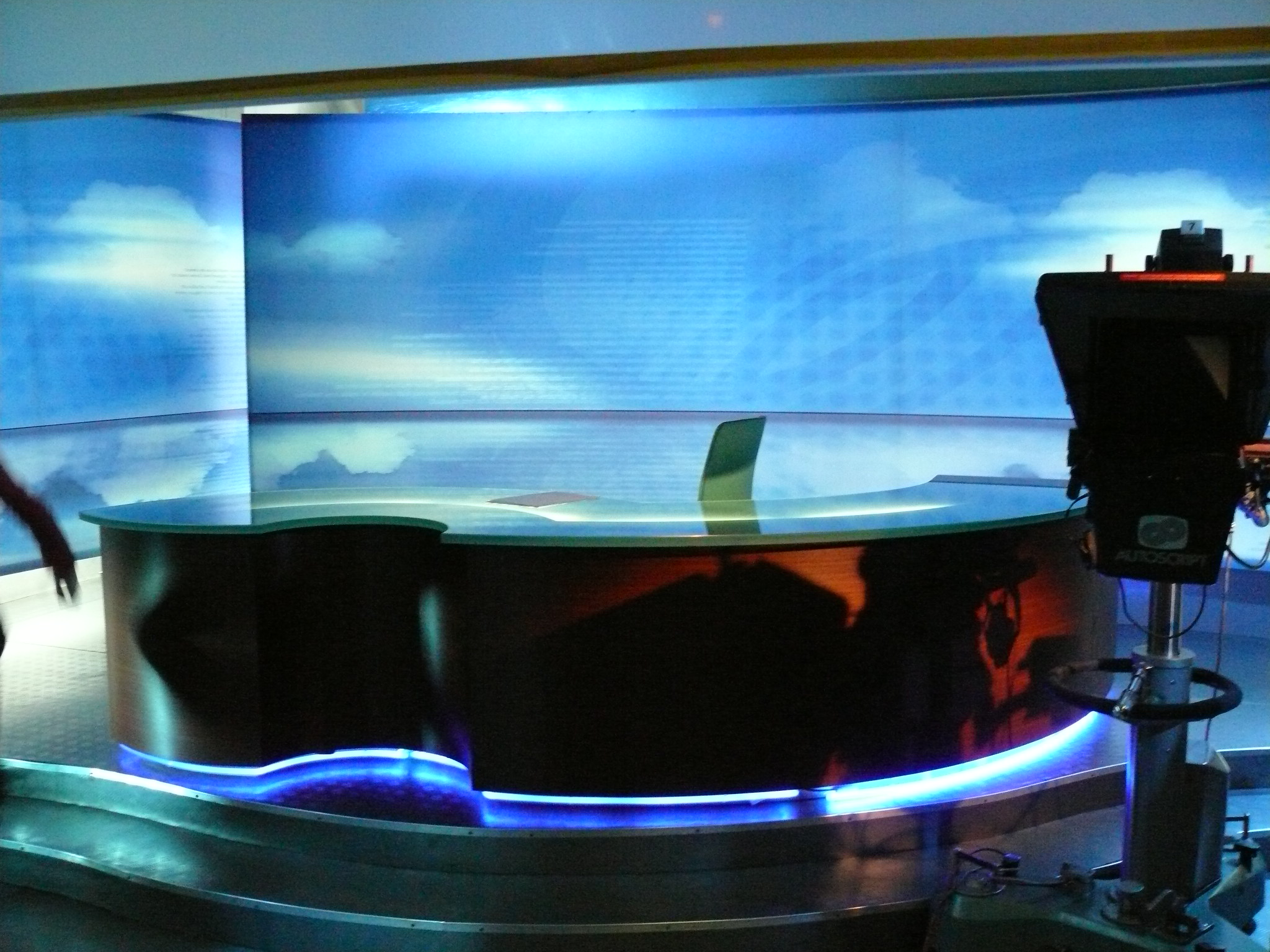 Studio programu informacyjnego Telewizji Wrocław, "Fakty". Autor zdjęcia: SNOL (Łukasz Owsiany)